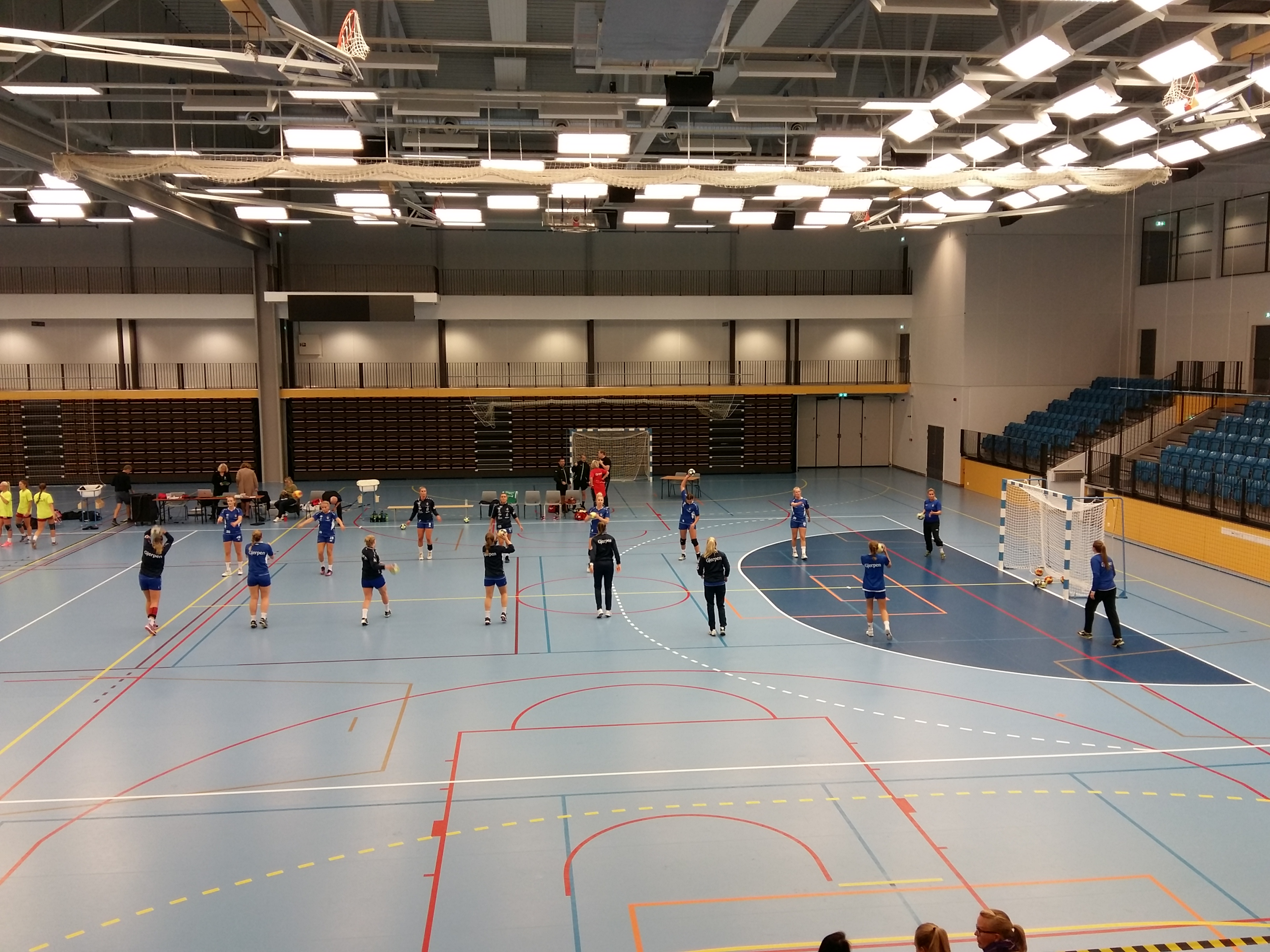 Gjerpen Håndball - oppvarming før NM-kamp mot Hønefoss Sportsklubb i AKA Arena, 30. august 2016.